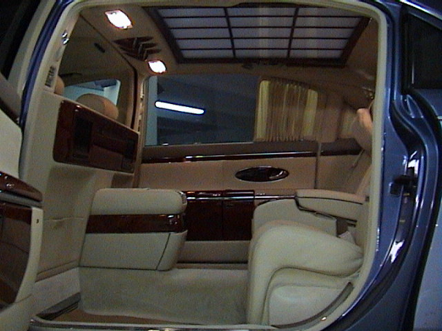 Maybach 62 mit elektro-transparentem Glasdach und Trennscheibe (Elektro-Transparenz ist hier z.B. nur für die Trennscheibe aktiviert, d.h. sie ist durchsichtig, während das Dach Einblicke verwehrt)